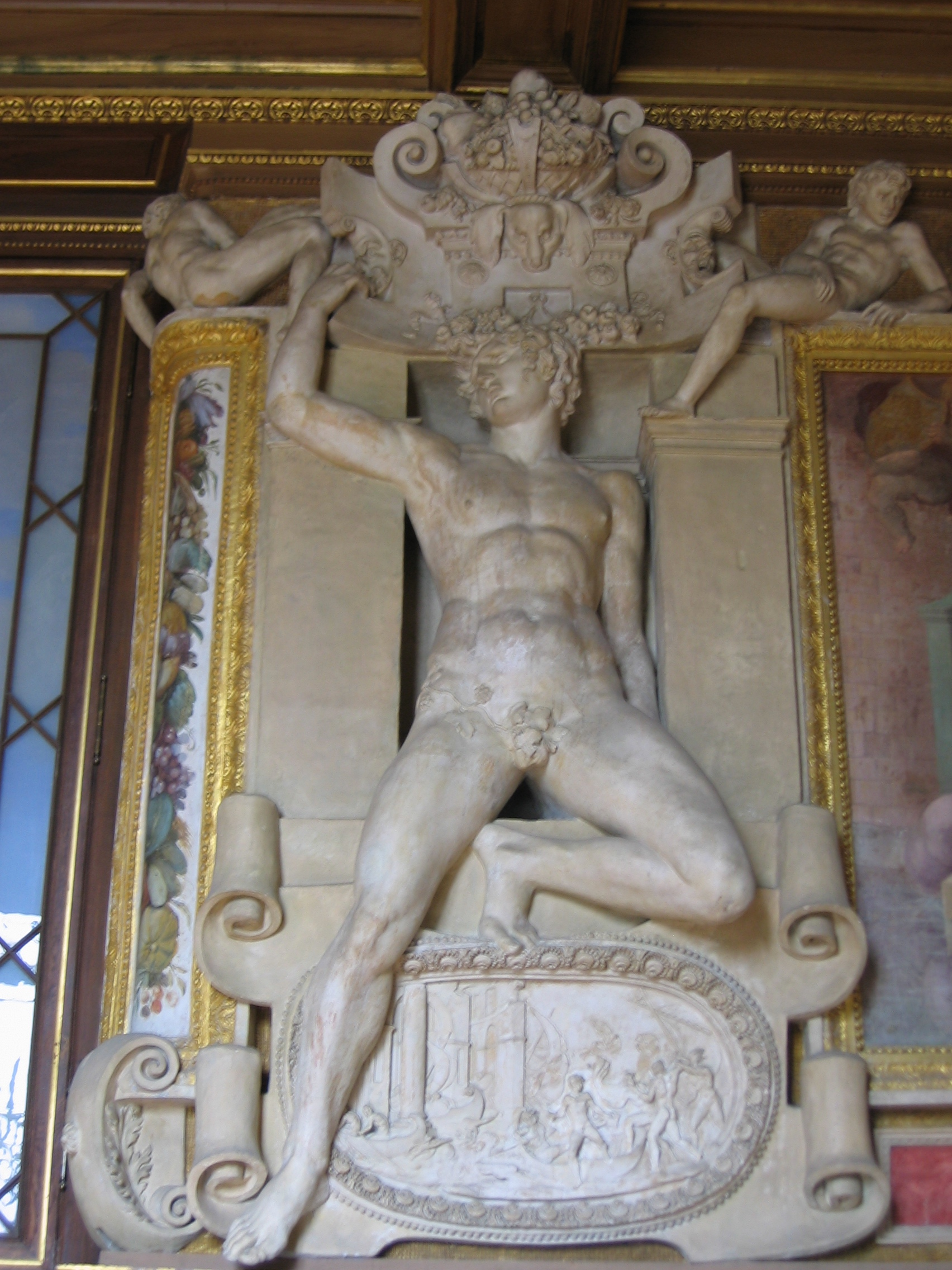 Fontainebleau.